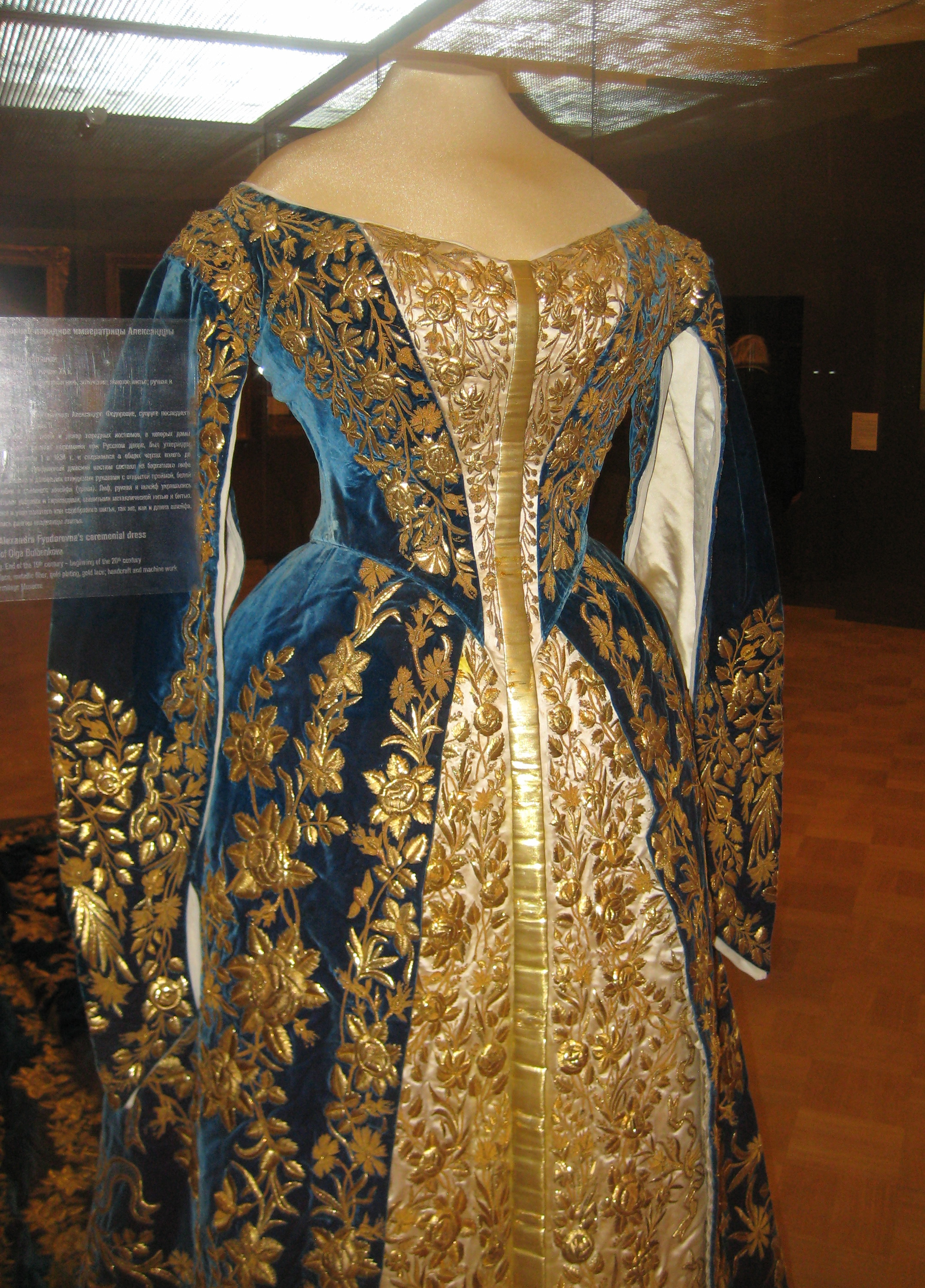 Платье придворное парадное императрицы Александры Федоровны. Мастерская О. Бульбенковой. СПб, конец 19 - нач. 20 века. Эрмитаж.